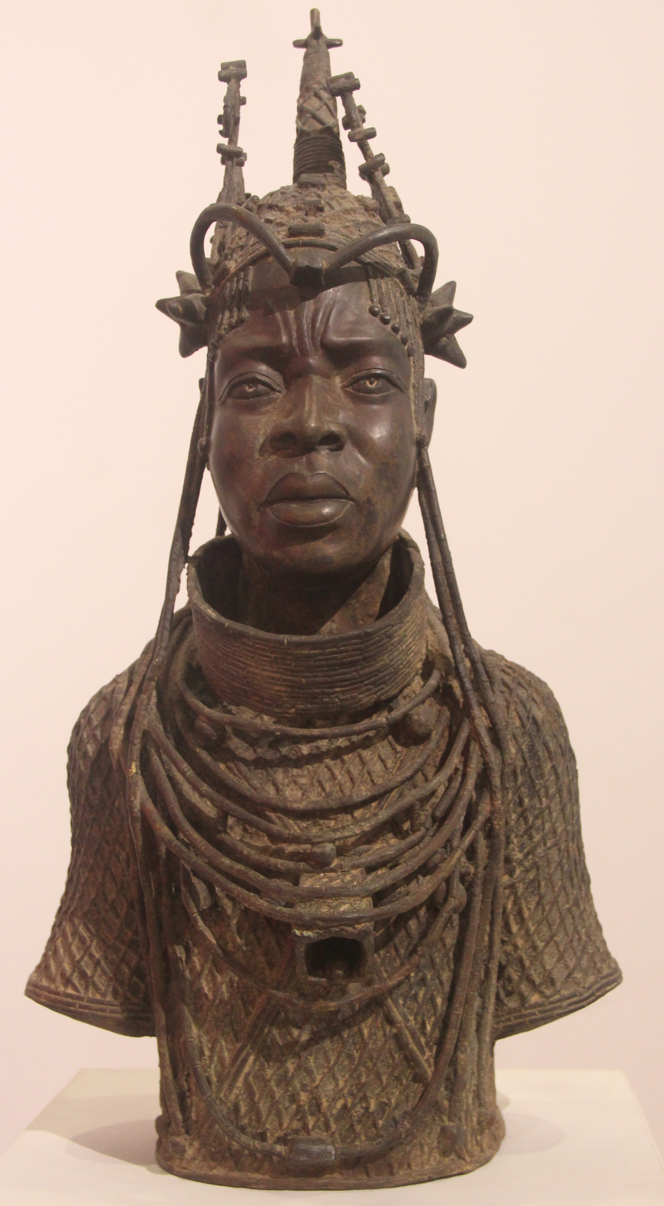 Oba Oguola. Musée des Civilisations Noires de Dakar (Sénégal).